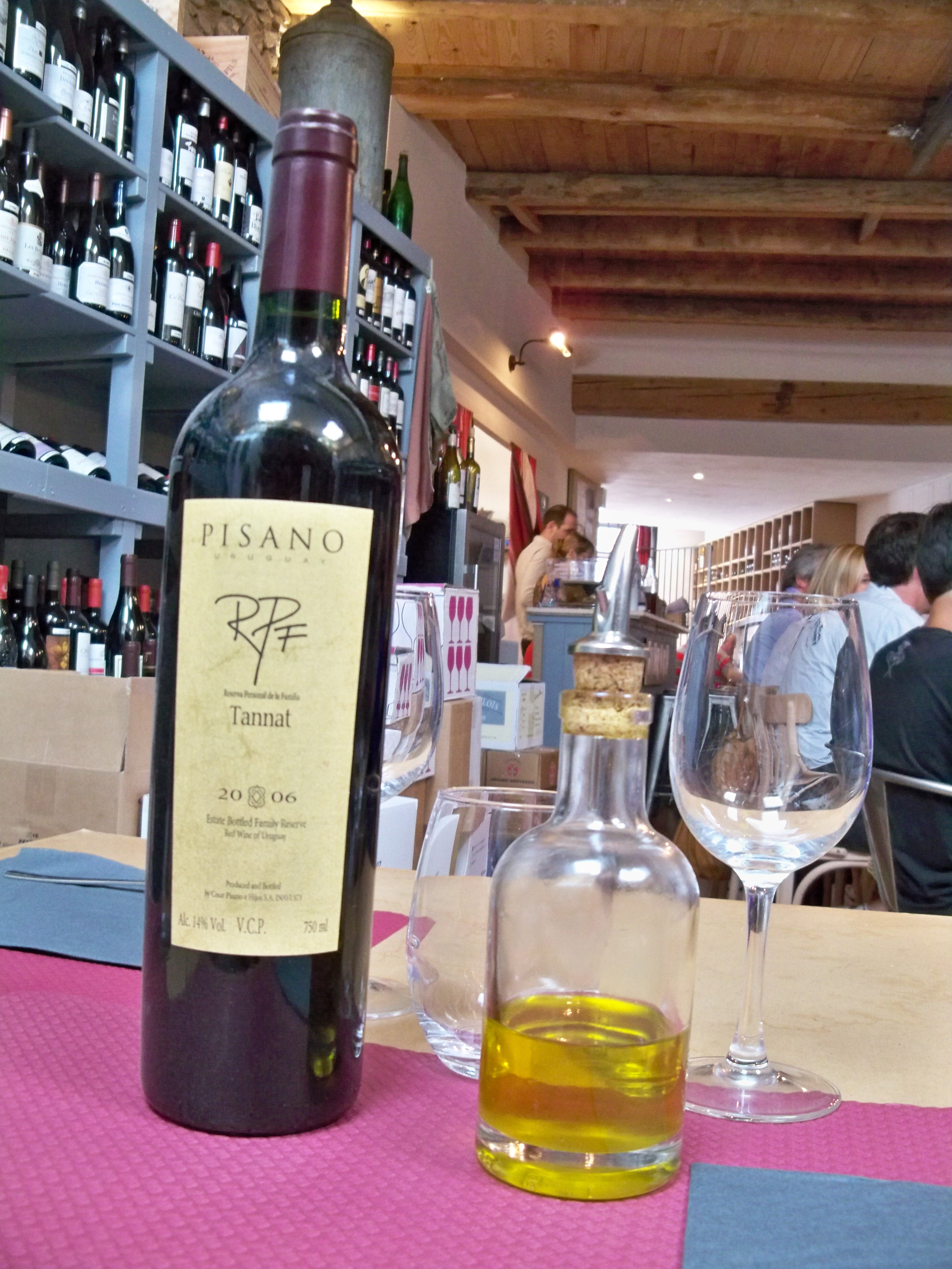 Vin d'Uruguay